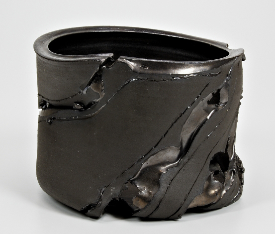 Carlo Zauli. Faenza